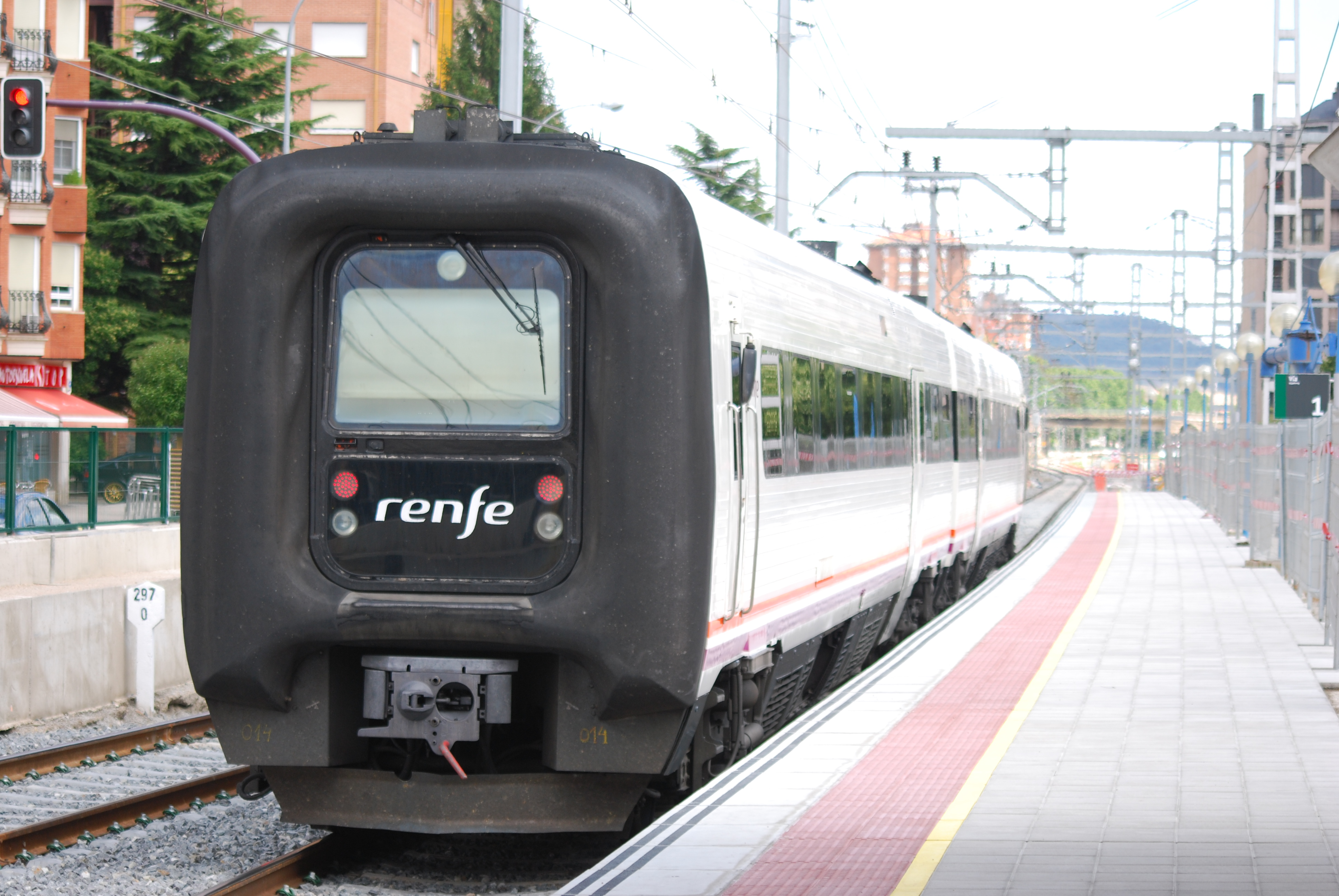 Train Renfe en gare de Palencia.